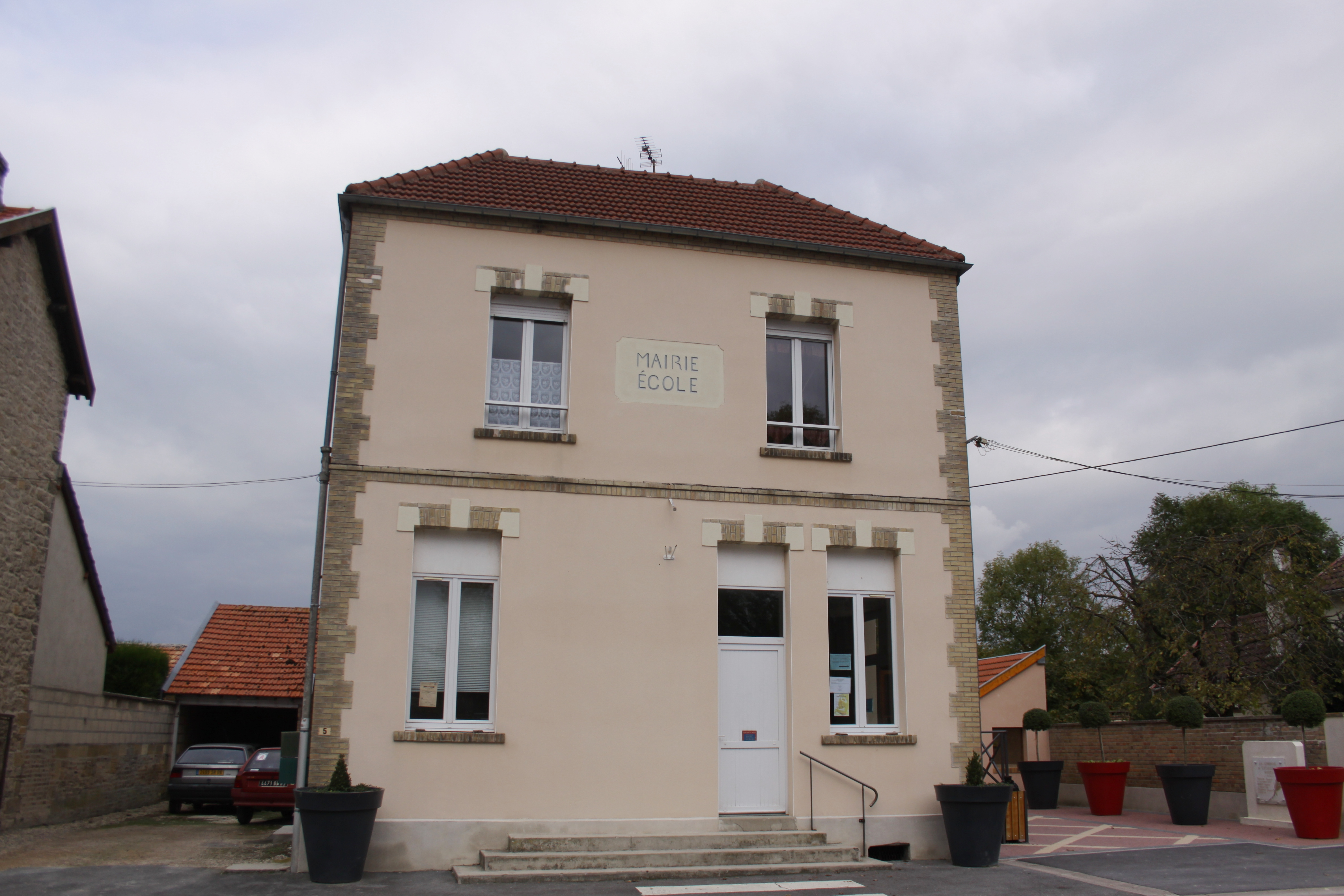 Village Ardennais